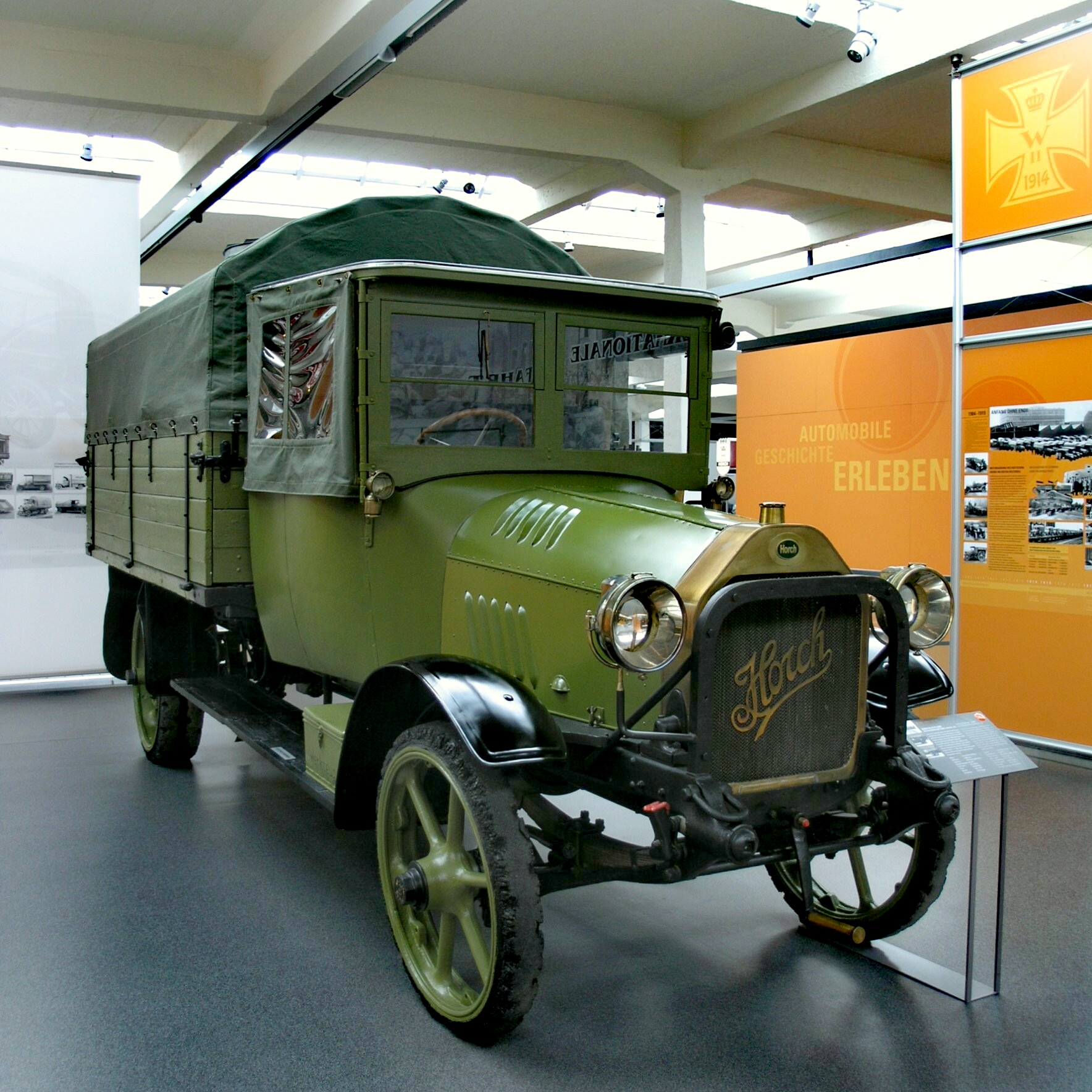 Horch 25/42 PS LKW (1916 / 1916-1922 2073 vozů